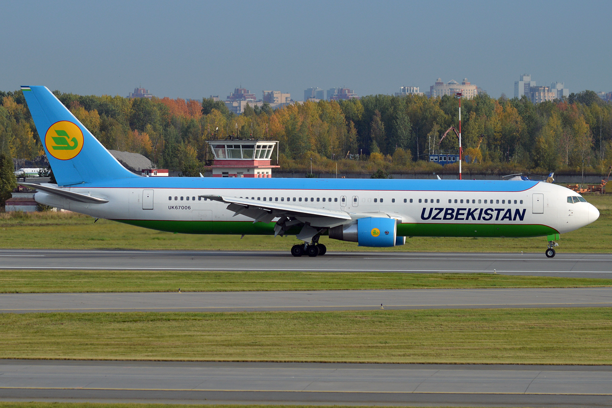 Uzbekistan Airways, UK67006, Boeing 767-33P ER